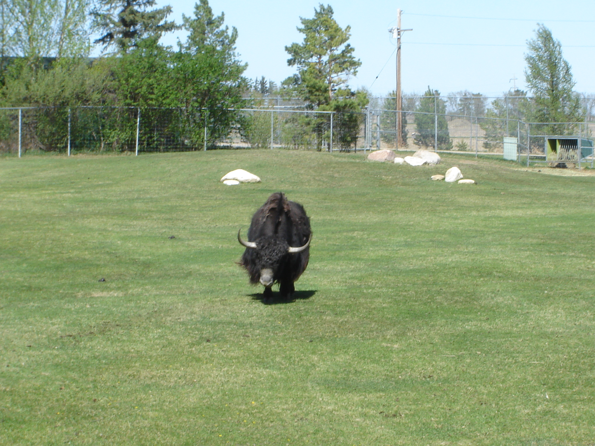 Yak (Bos grunniens) Forestry Farm Park and Zoo Saskatoon Saskatchewan Canada